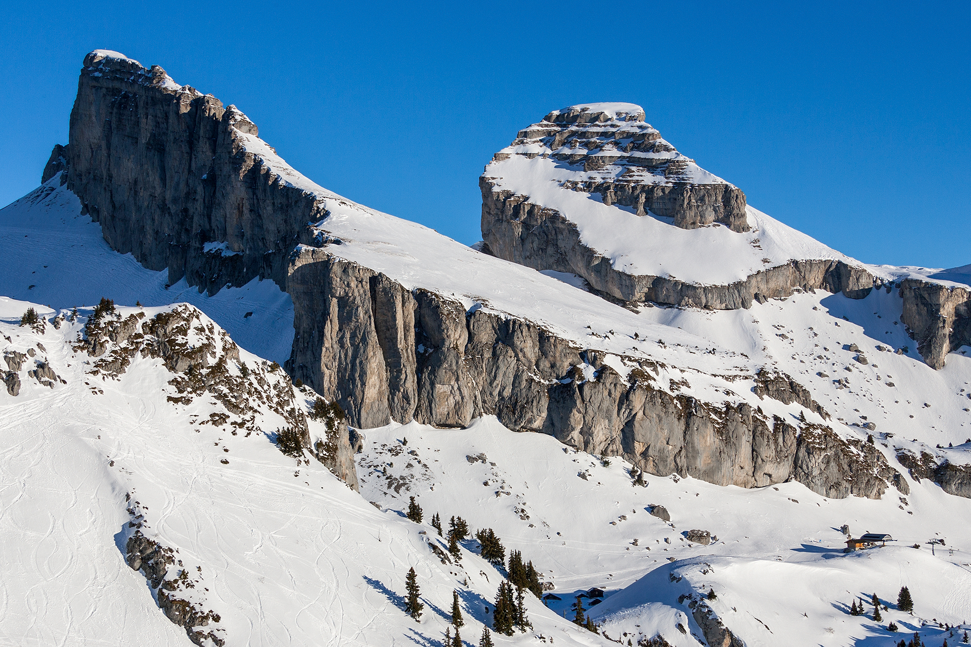 Tour d'Aïe et Tpur de Mayen, Leysin (VD)